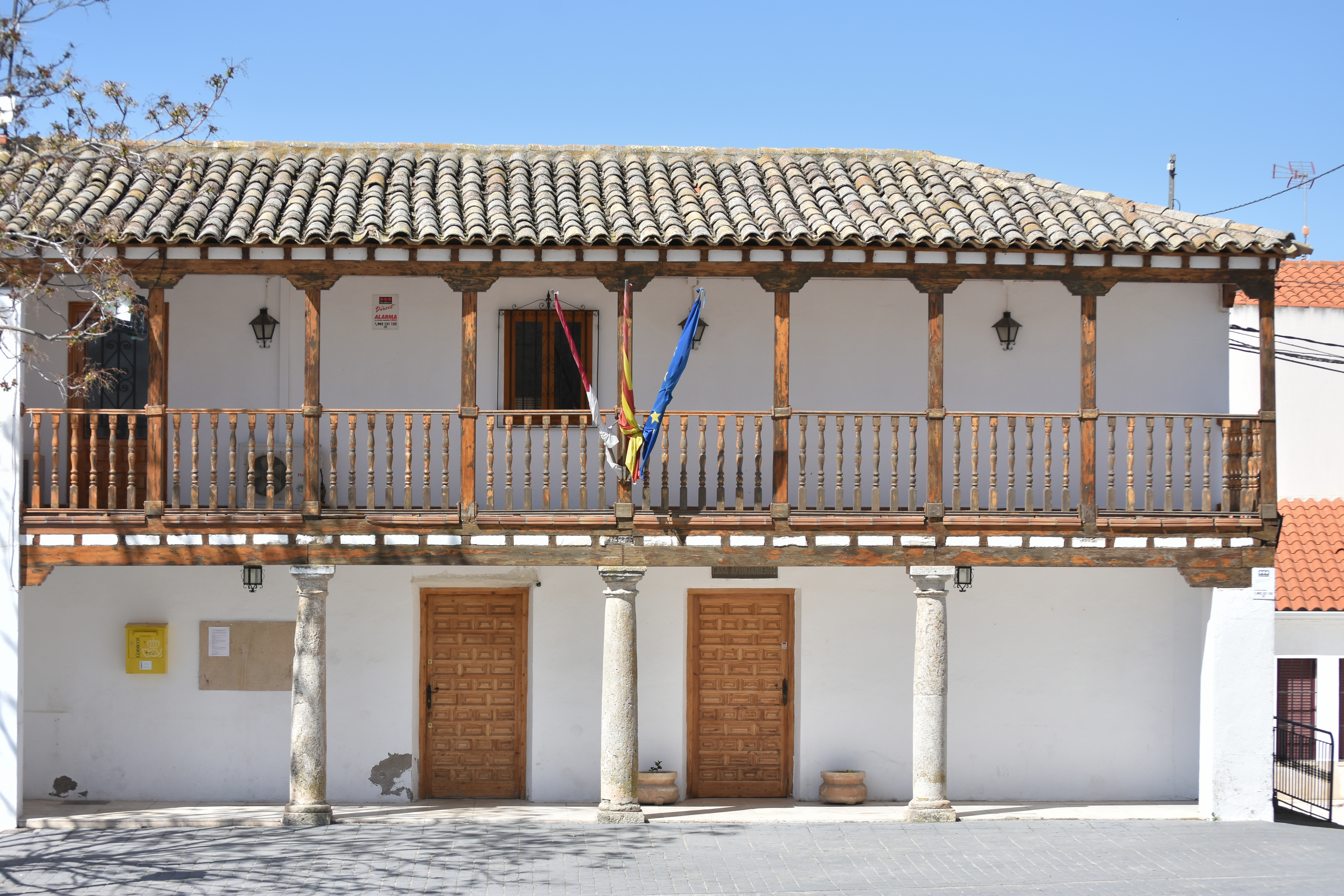 Ayuntamiento de Torrubia del Campo.